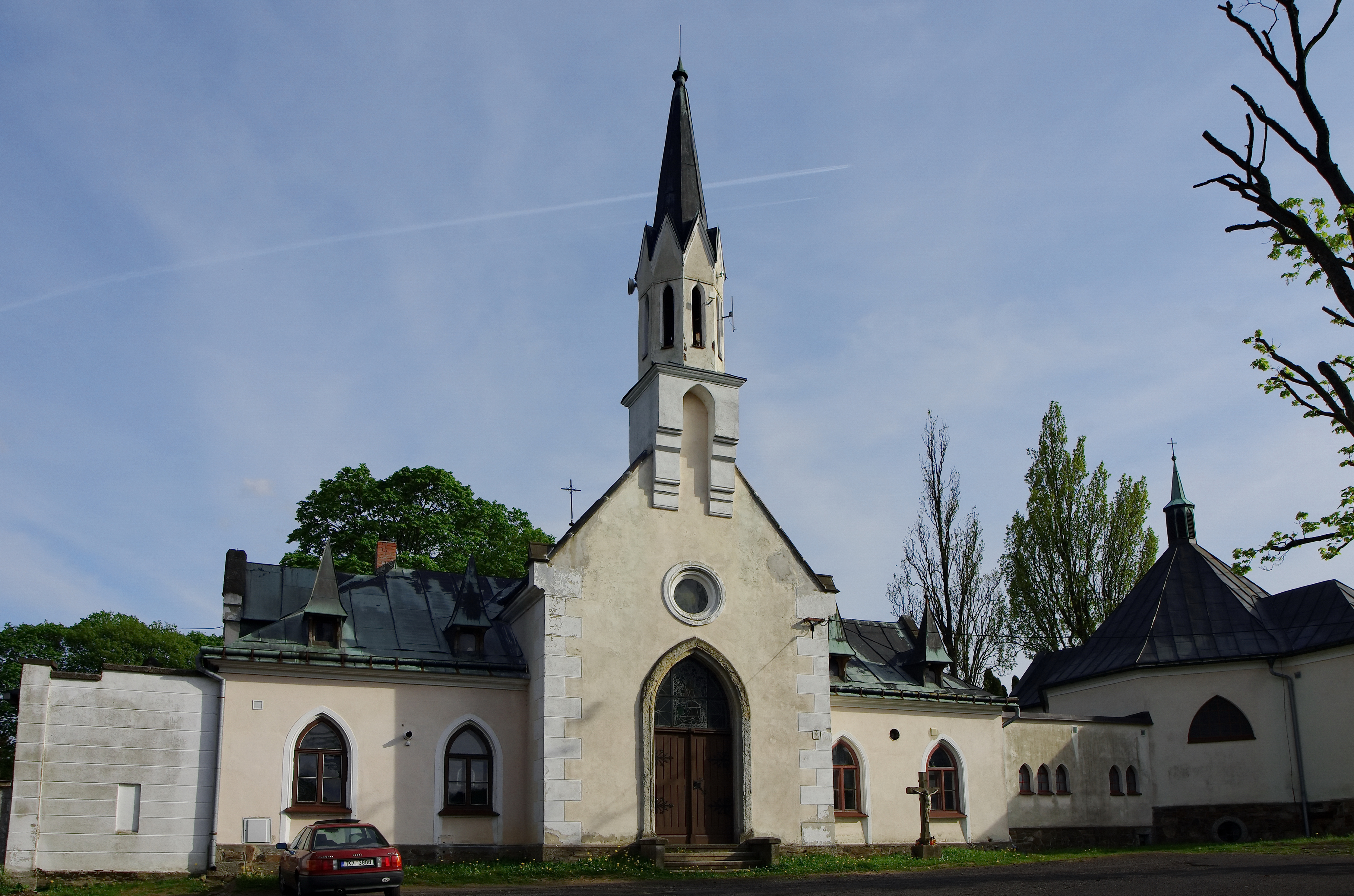 Hřbitovní kaple s rozlučkovou síní, Hřbitovní 800, Kraslice (okres Sokolov).